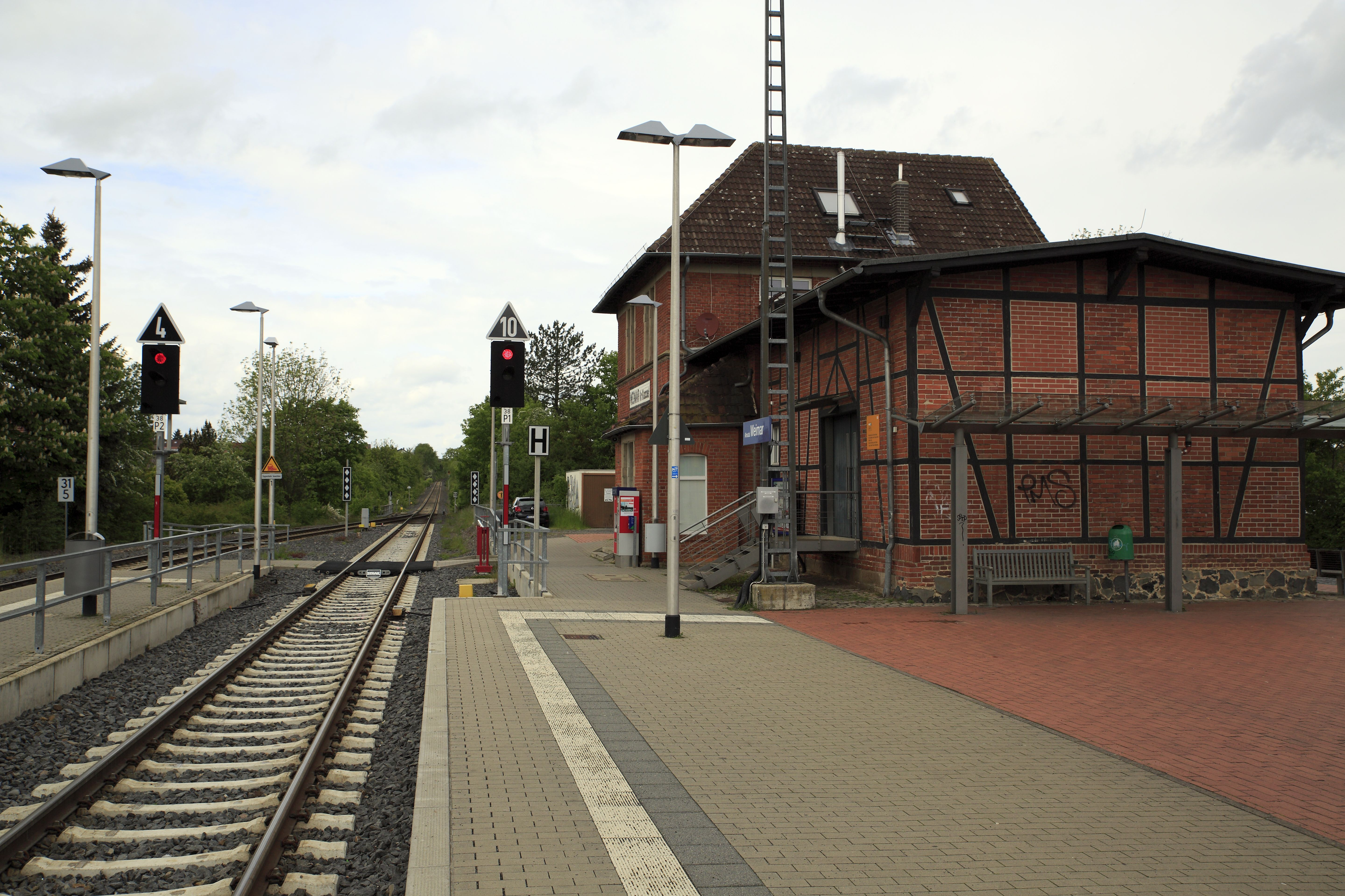 Das ehemalige Empfangsgebäude des Bf Weimar (Kr Kassel), für den Eisenbahnbetrieb wird es nicht mehr benötigt. Im Anbau auf der Gleisseite befand sich früher das Stellwerk. 2014 verkehren alle haltenden Züge planmäßig auf dem durchgehenden Hauptgleis 1. Wie bei Abweichungen die manuell zu bedienende Bahnstreigschranke bewegt wird, ist nicht zu erkennen.